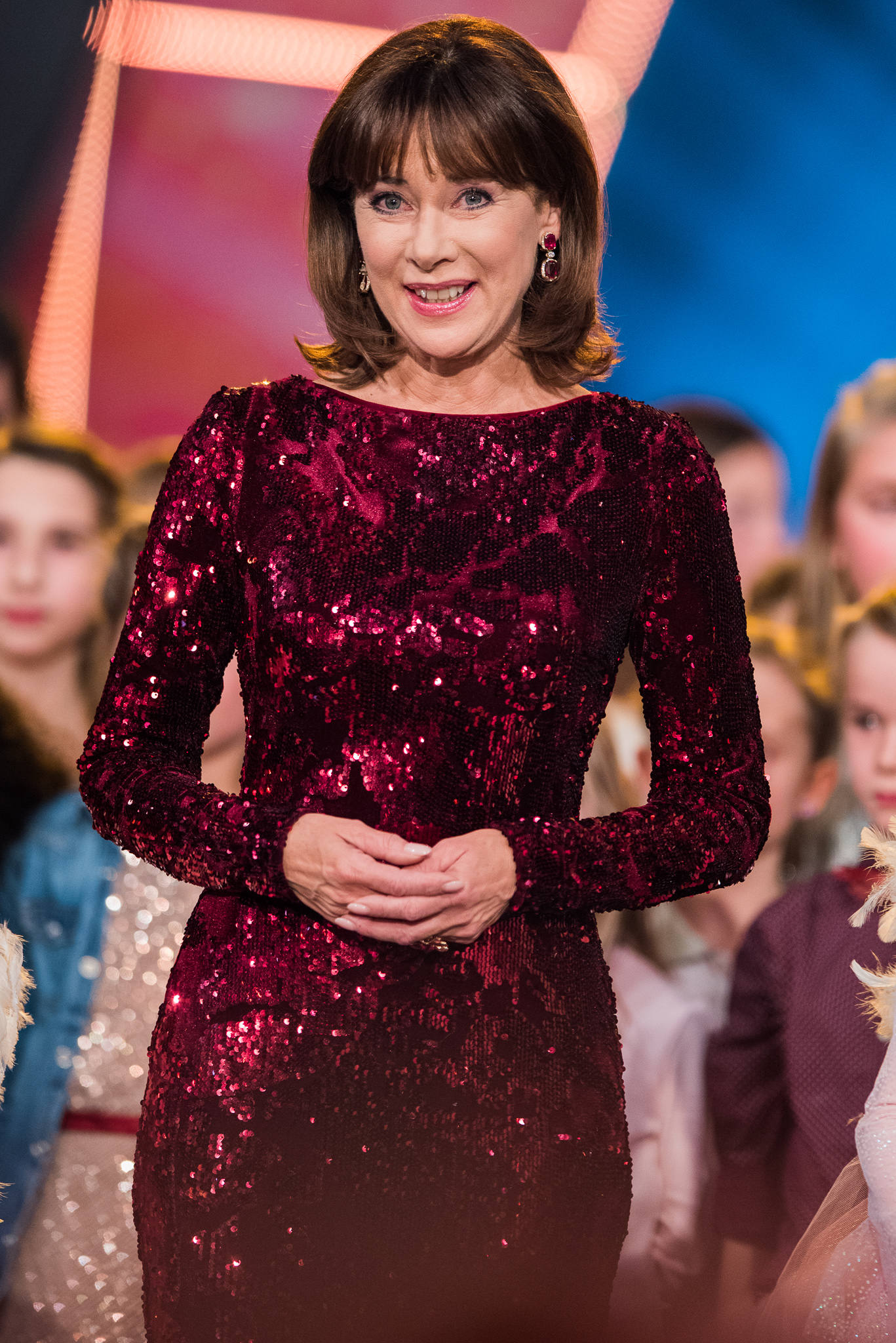 BR,Bayerisches Fernsehen,Frankenhalle,Live-Sendung,Sabine Sauer,Sternstunden-Gala,Sternstundengala